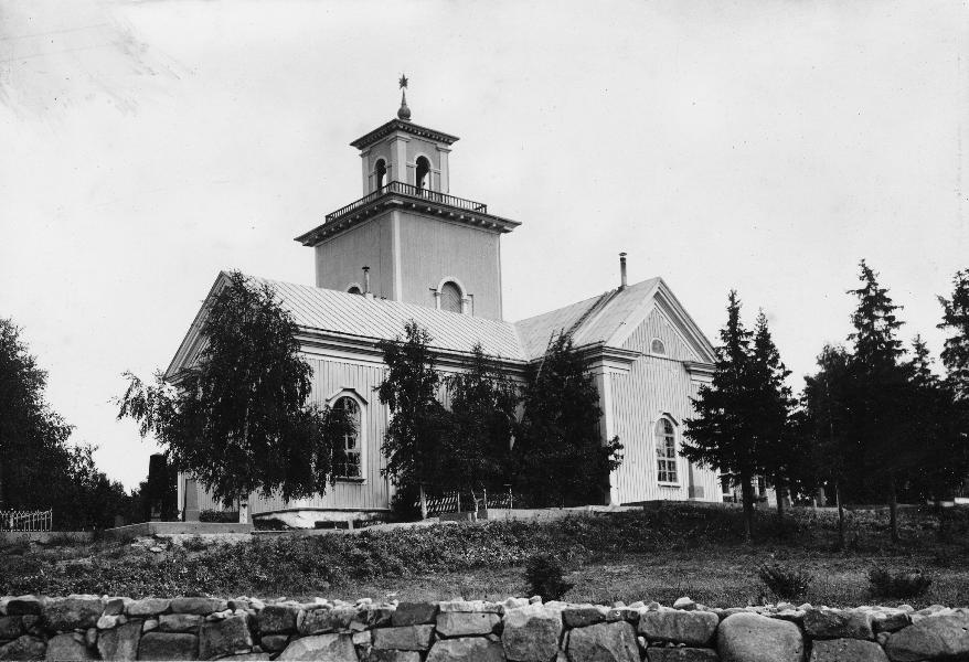 Kyrkan från nordväst. Kategori: (01) ExteriörerKyrkan från nordväst.